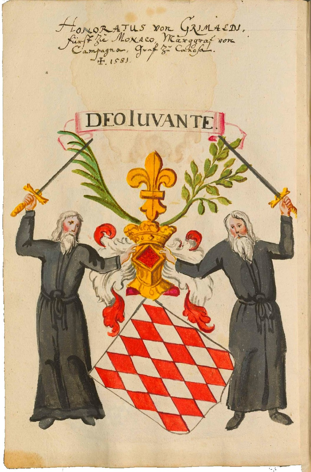 stemma dei principi di Monaco